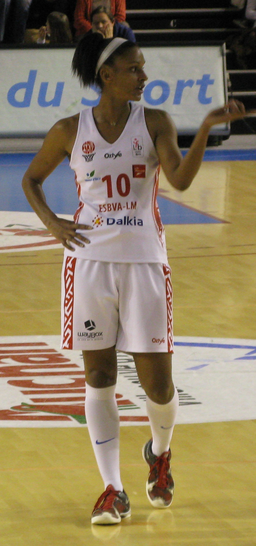 Lenae Williams au Palacium, lors du match ESBVA vs Saint-Amand Hainaut, championnat LFB.